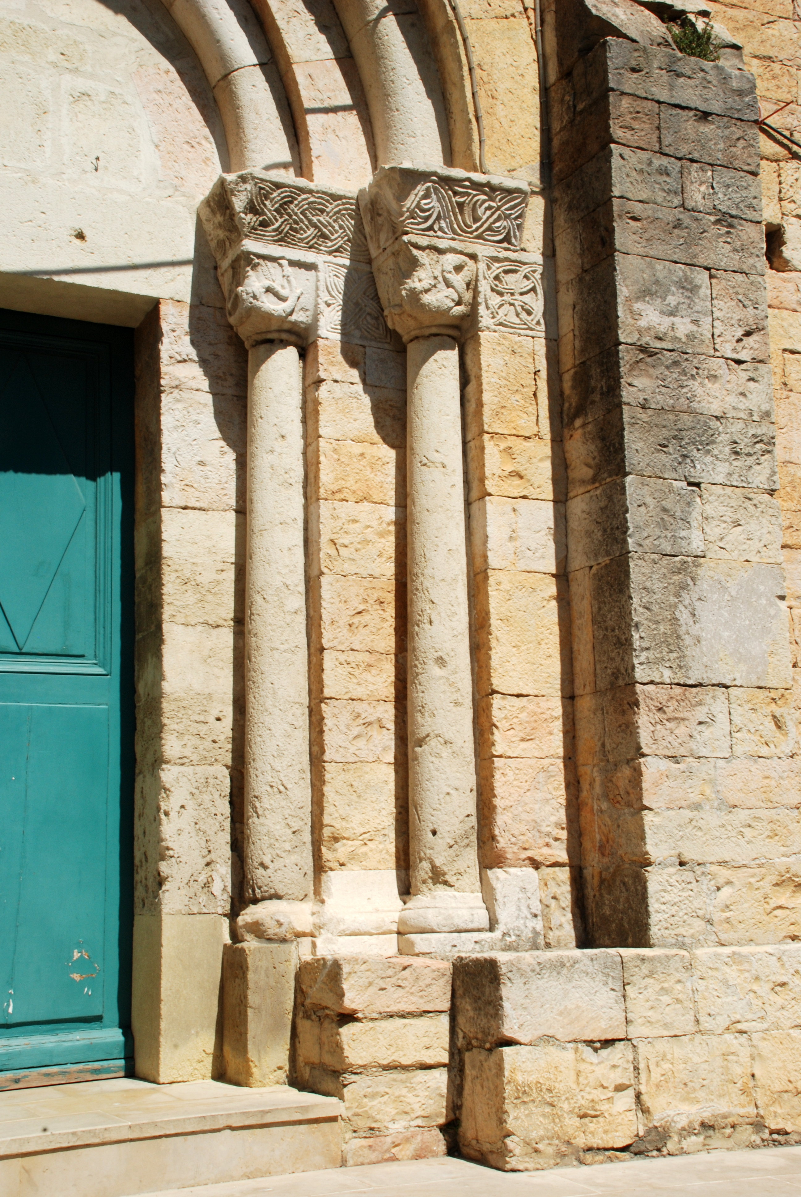 France - Gard - Église Saint-André de Bernis